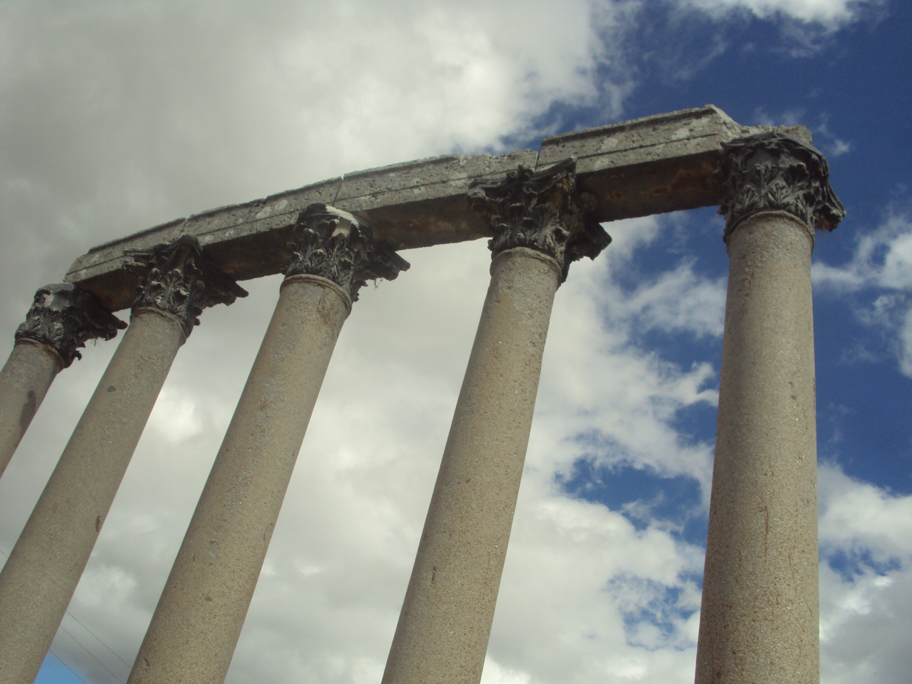 Şans Tapınağı (Temple of Tyche) sütun detayı.